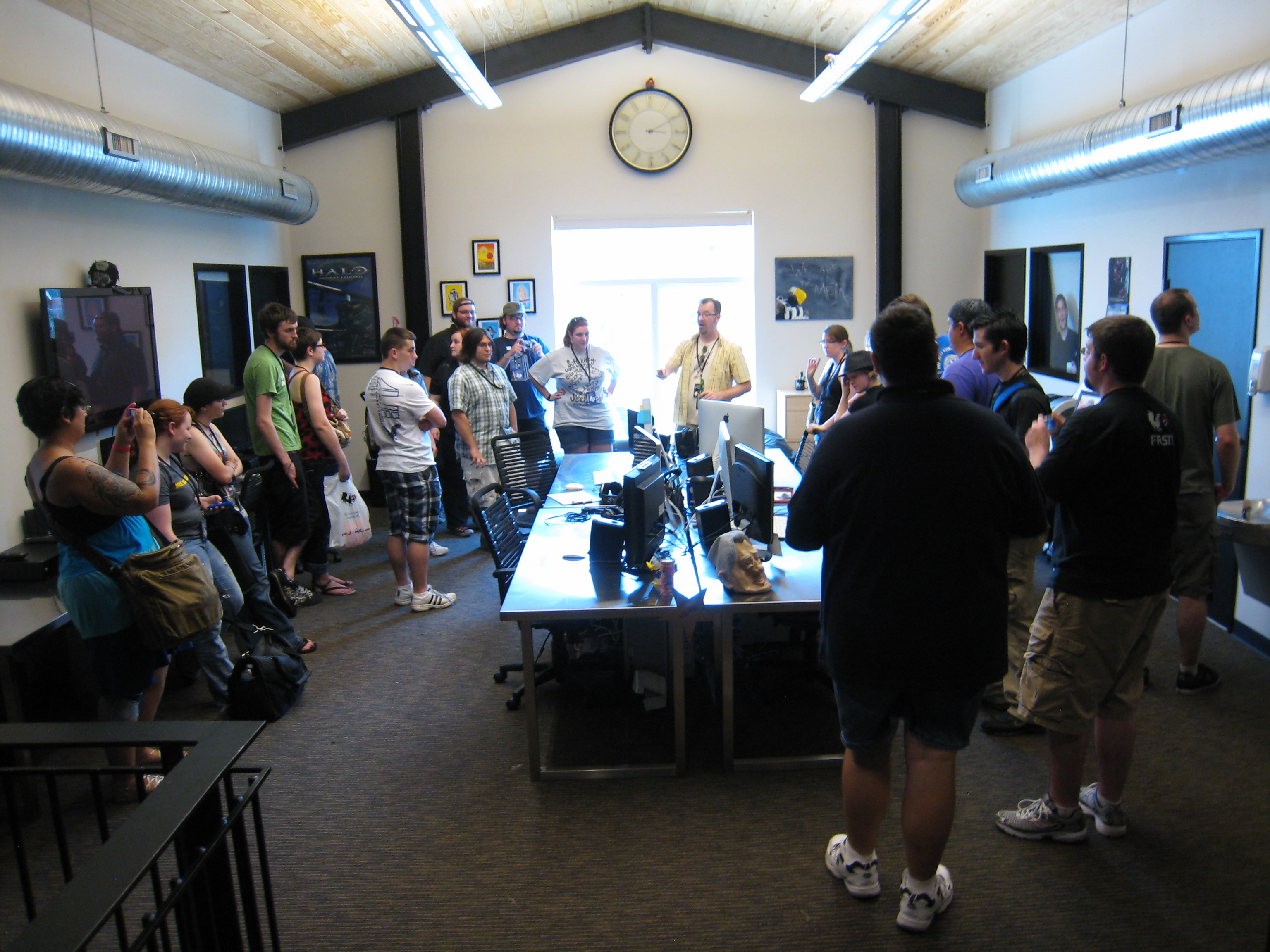 As seen on Tumblr